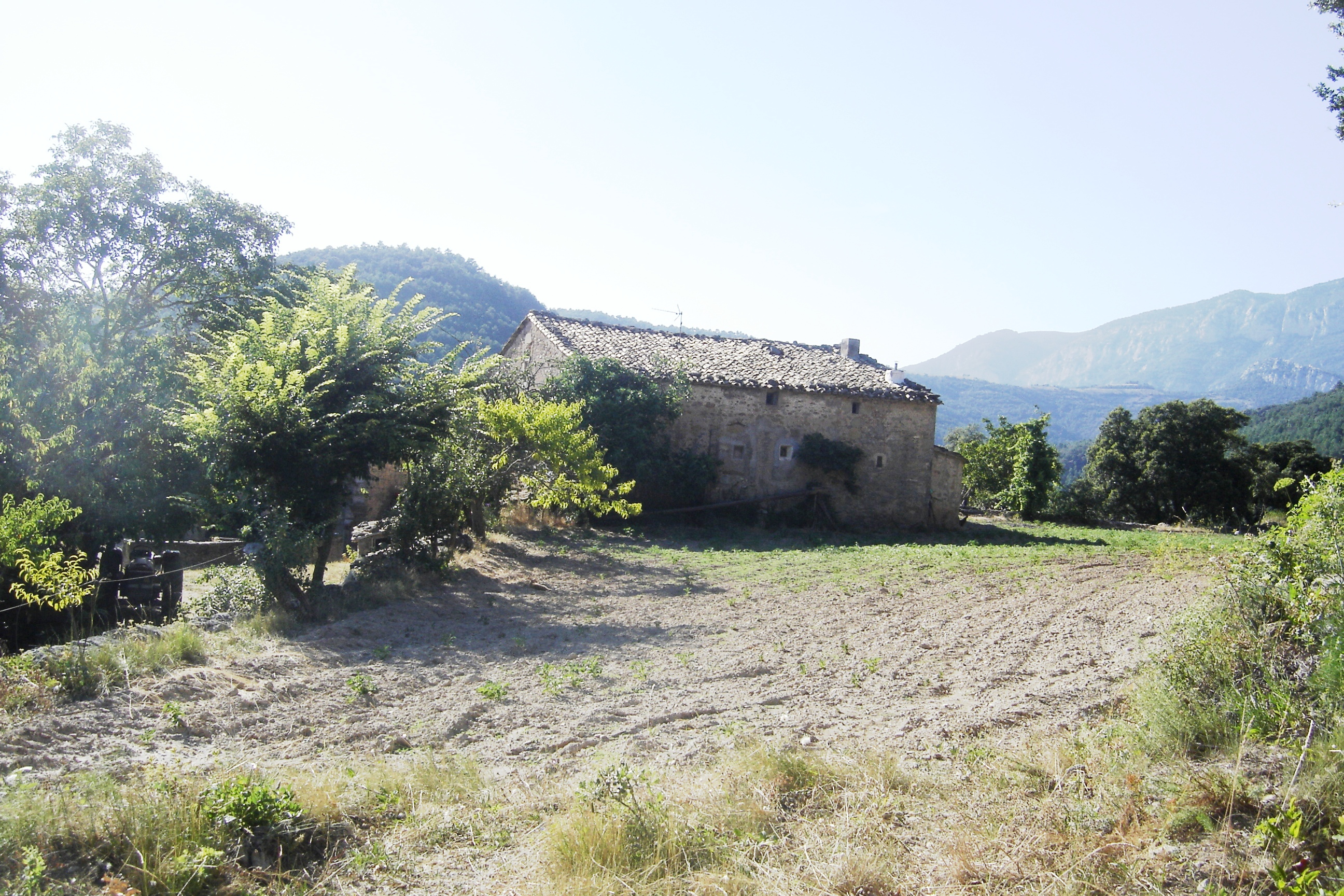 La masia de Junyent (Odèn) (Solsonès)